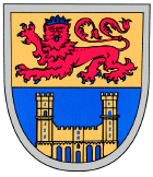 Wappen der Gemeinde Reichenberg im Rhein-Lahn-Kreis